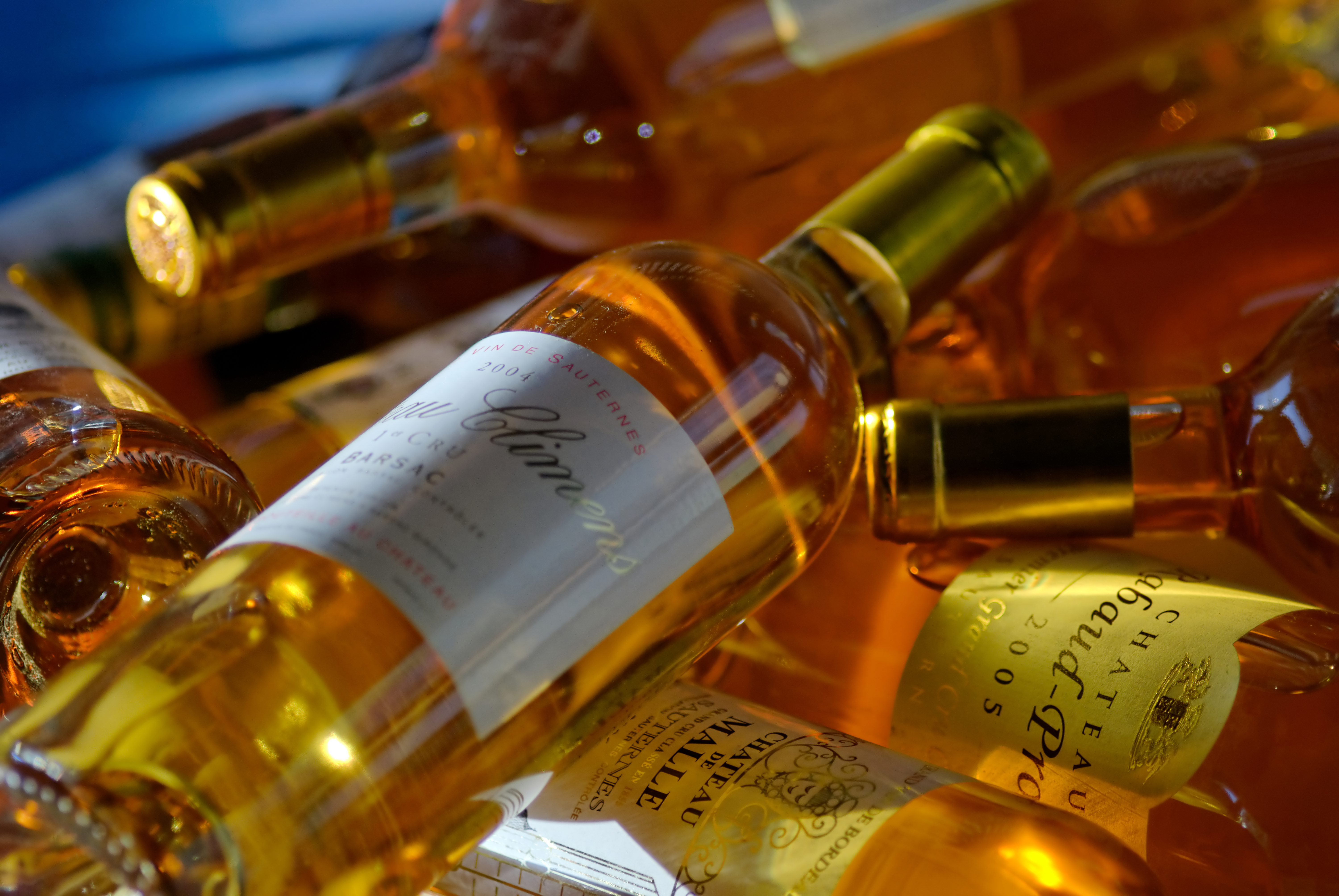 Grands crus classés de Sauternes-Barsac